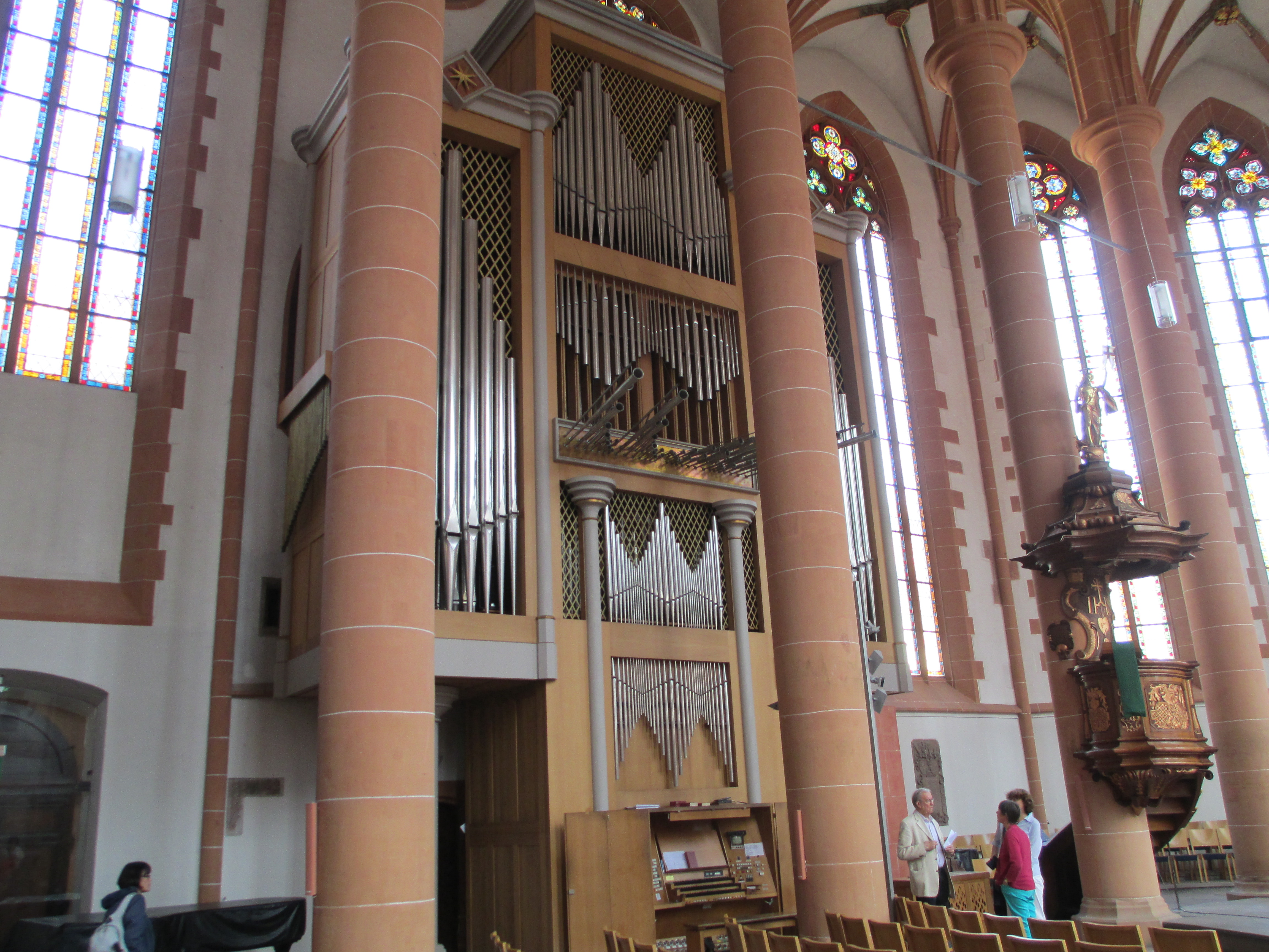 האורגן בכנסיית רוח הקודש בהיידלברג